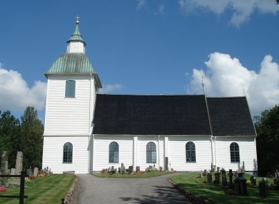 Burseryds kyrka i Gislaveds kommun